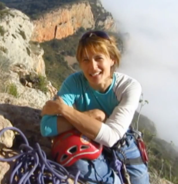 Araceli Segarra, alpinista